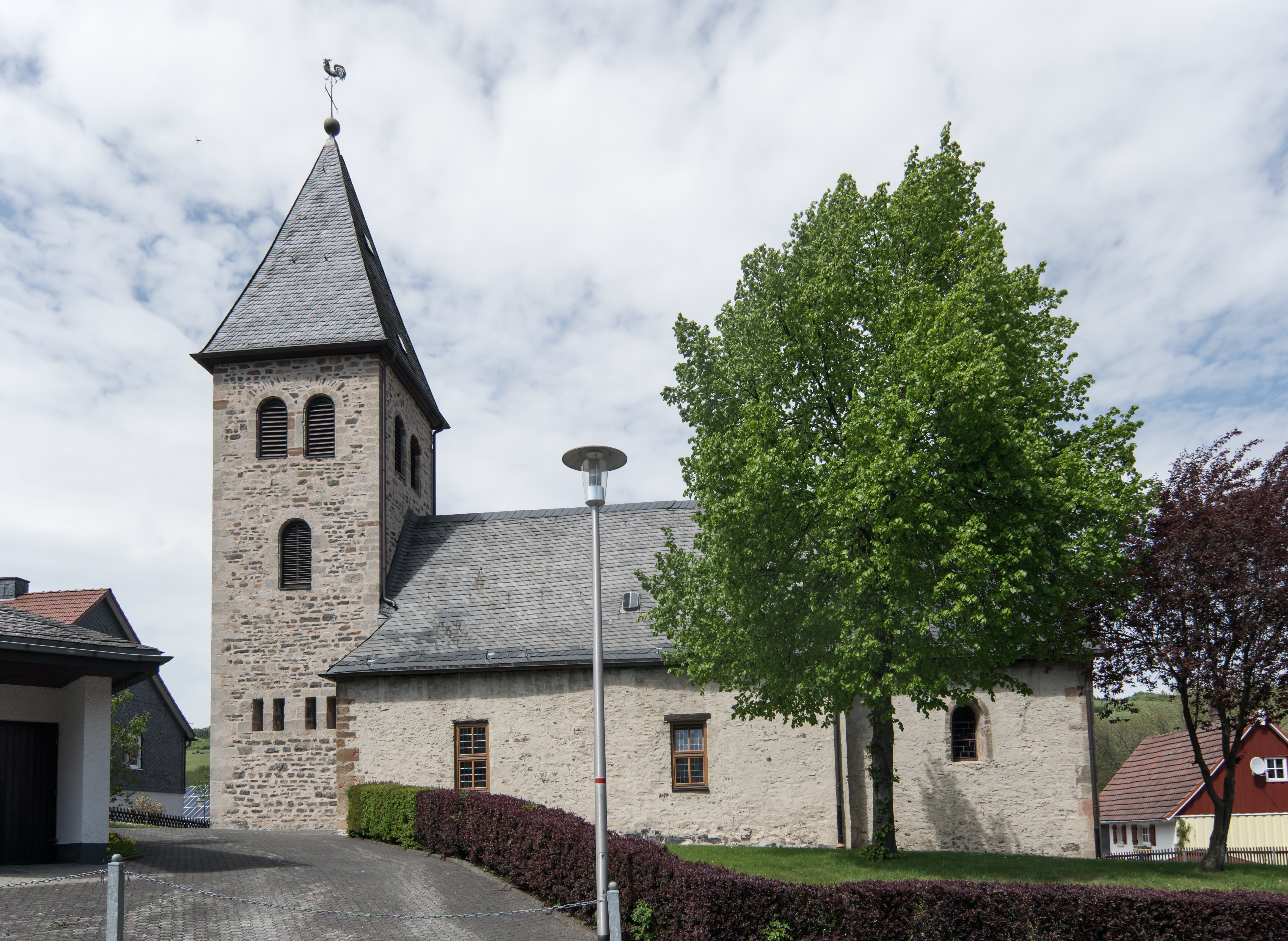 Neerdar St. Pankratius von Süden